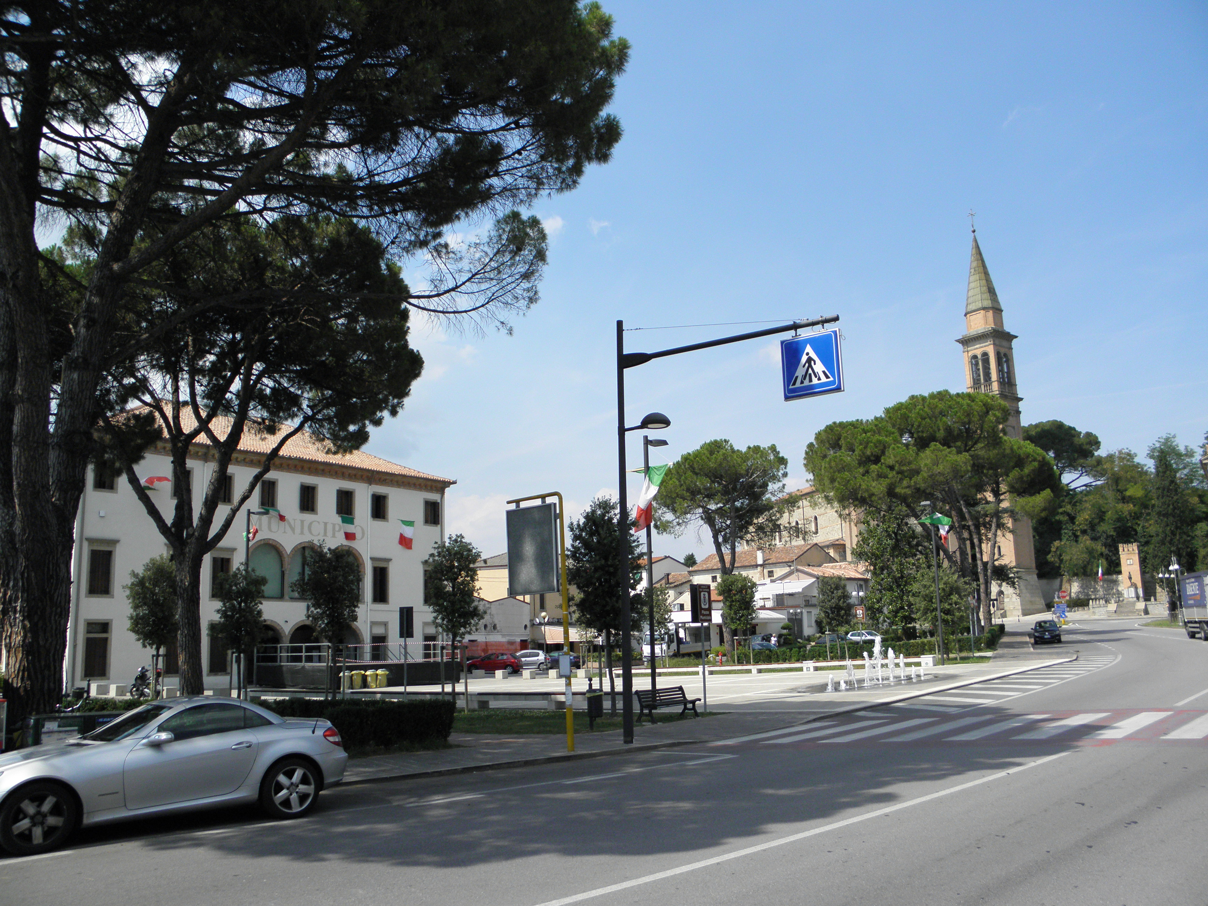 Carrara San Giorgio, sede municipale del comune di Due Carrare: veduta di Via Roma e della Piazza del Municipio.